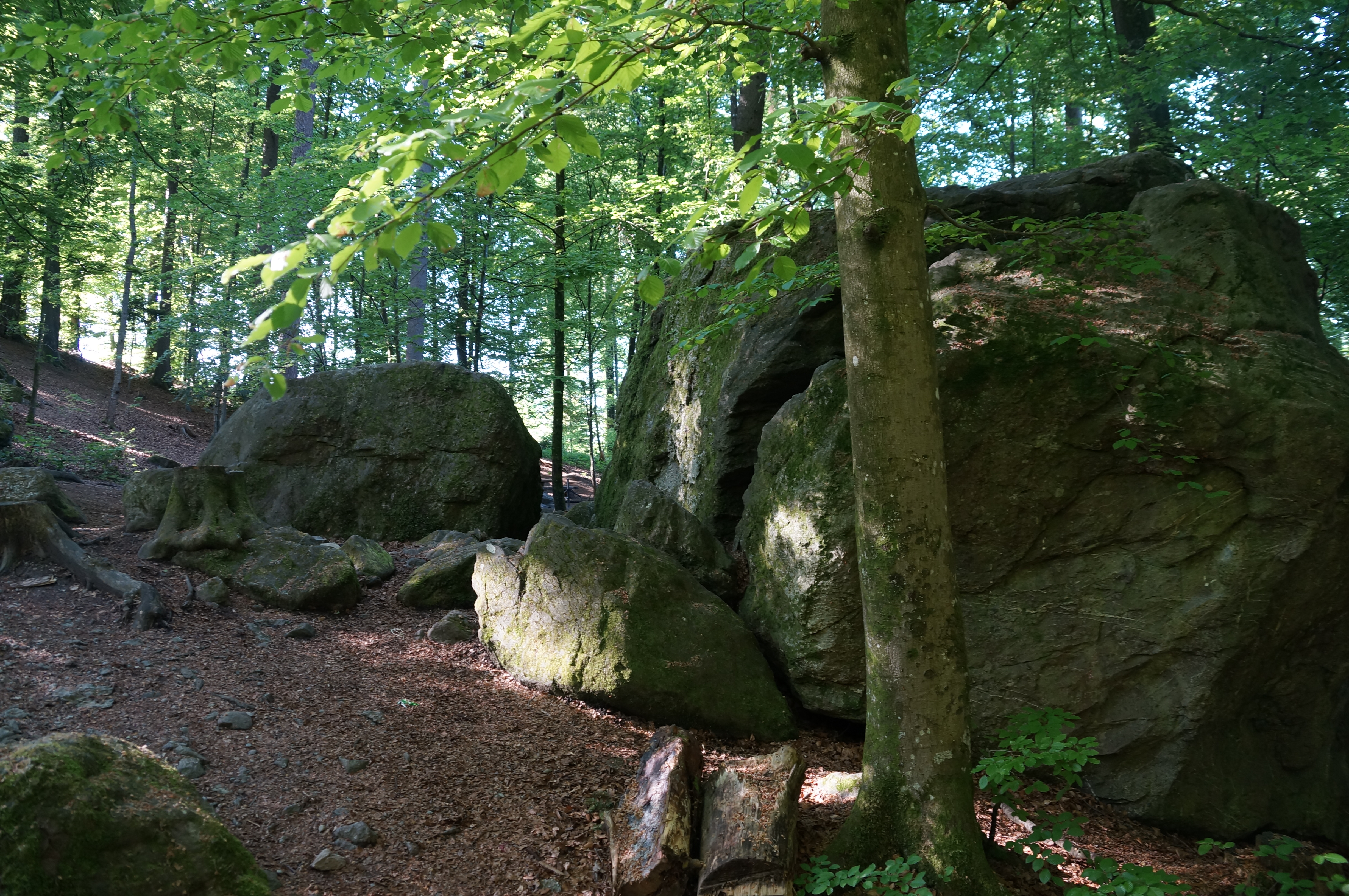 Eratische Blöcke im Jörentobel, geschützte Landschaft im Bundesinventar der Landschaften und Naturdenkmäler von nationaler Bedeutung, oberhalb von Fällanden, Kanton Zürich, Schweiz